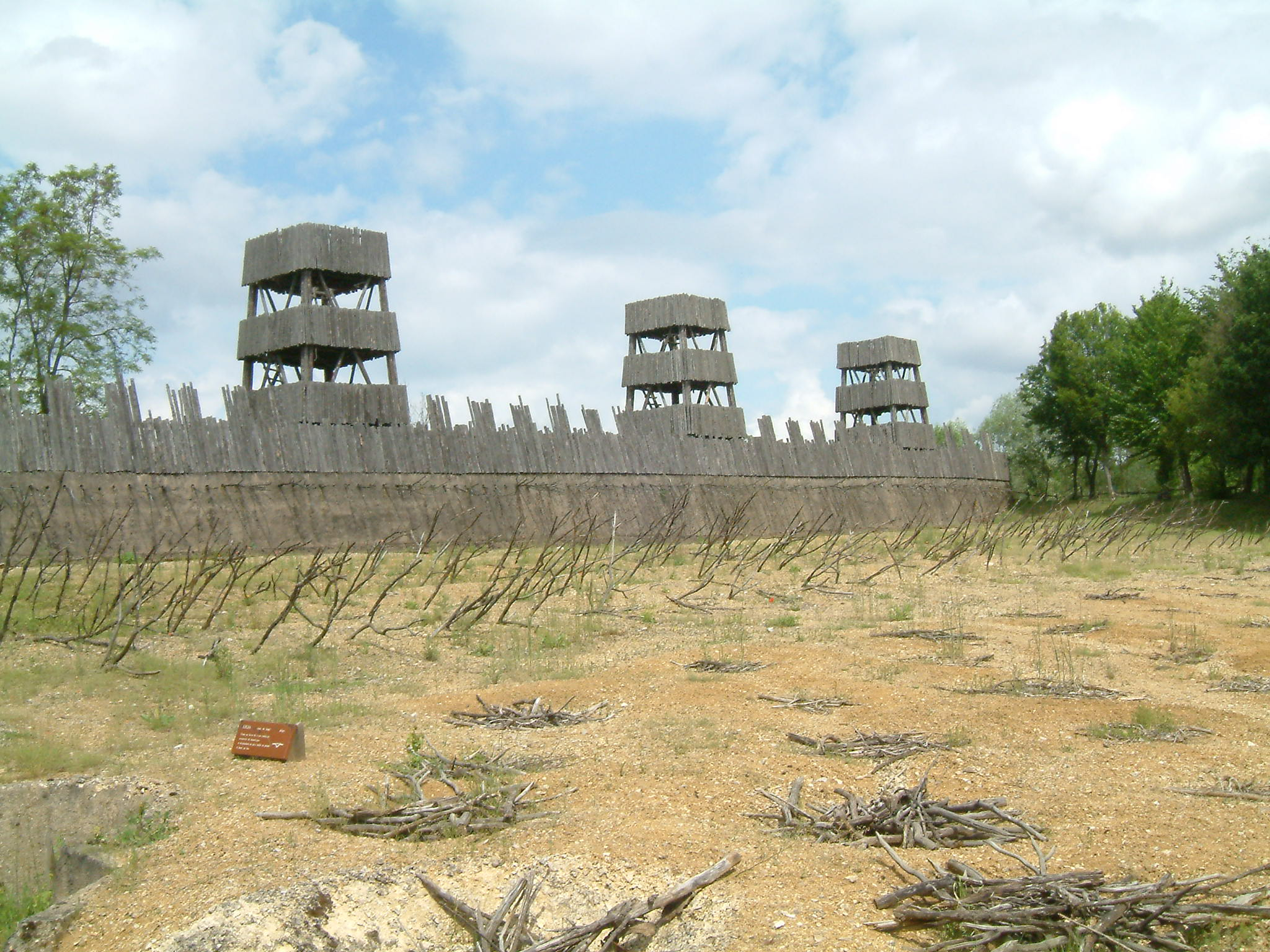 Réplique des fortifications utilisée lors du siège d'Alésia, Archéodrome de Beaune, Merceuil, Bourgogne, FRANCE.